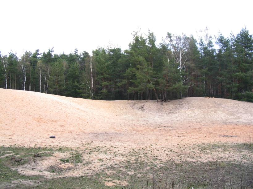 Binnendüne in Norden von Nürnberg (Erlenstegener Forst) (49°32.242'N 11°03.261'O). Gammakorrektur (0.62) durchgeführt.